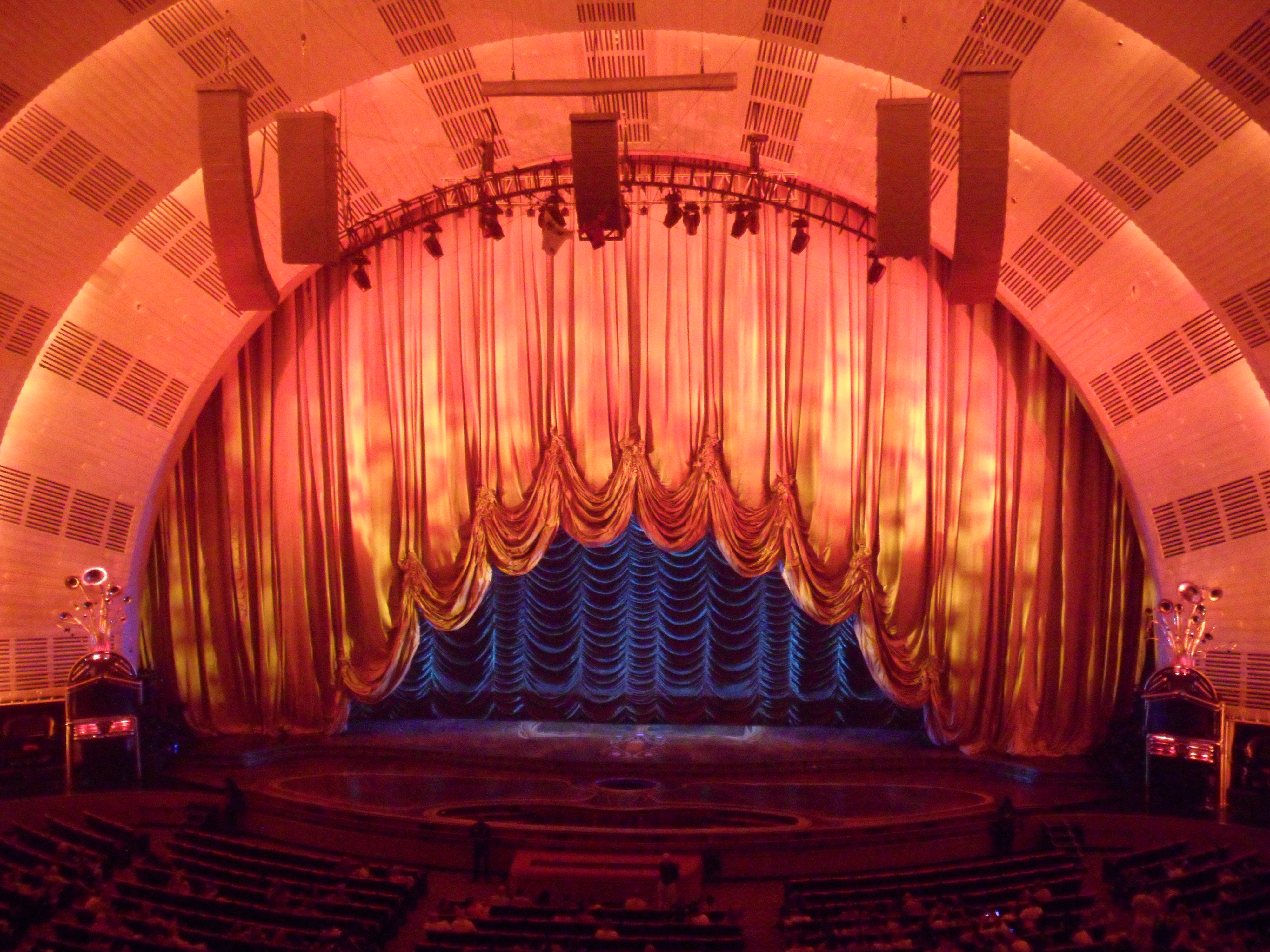 El telón del escenario principal del Radio City Music Hall. Nueva York, Estados Unidos, 22 de julio de 2011.